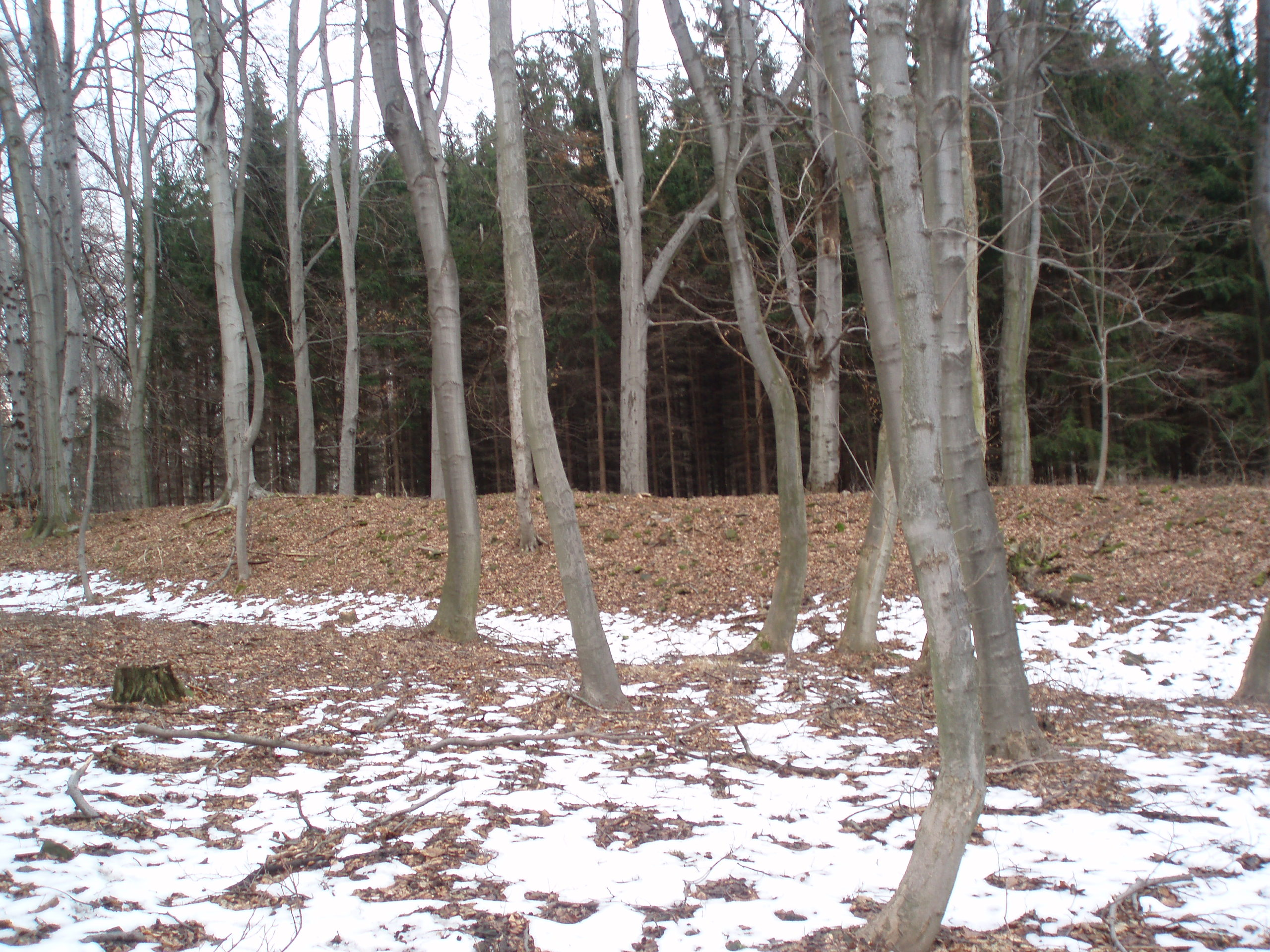 Hradiště Domoušice - jihozápadní val